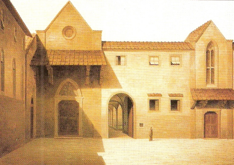 Antica facciata dell' Ospedale di Santa Maria Nuova